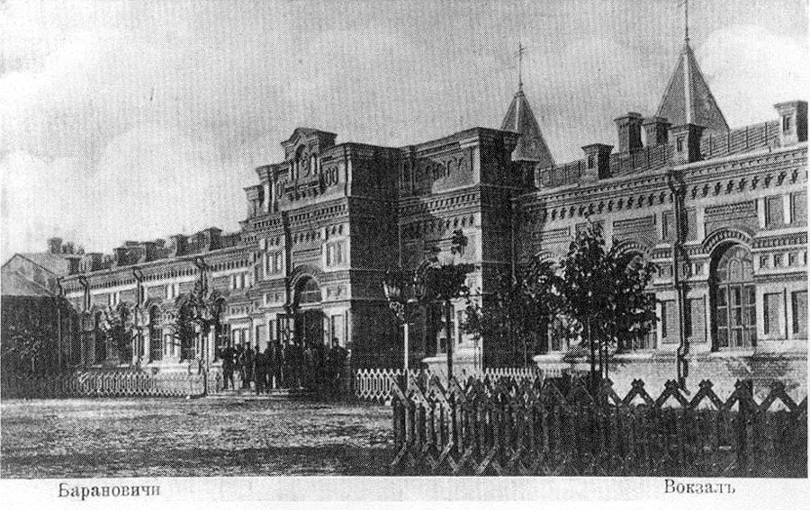 Ст. Барановичи Полесские